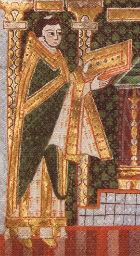 Bernward, Bischof von Hildesheim 993-1022